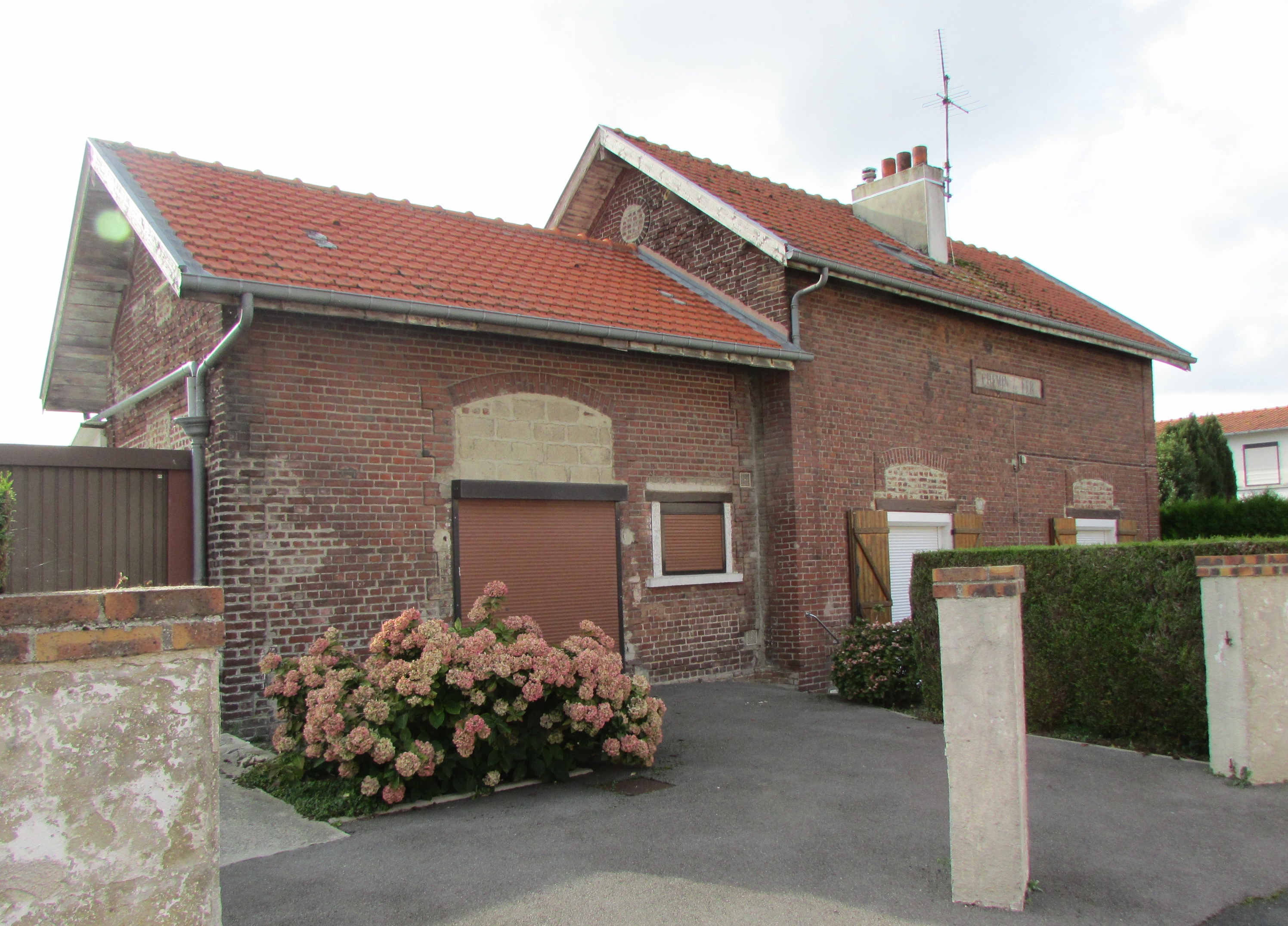 La gare de Seboncourt en 2017.